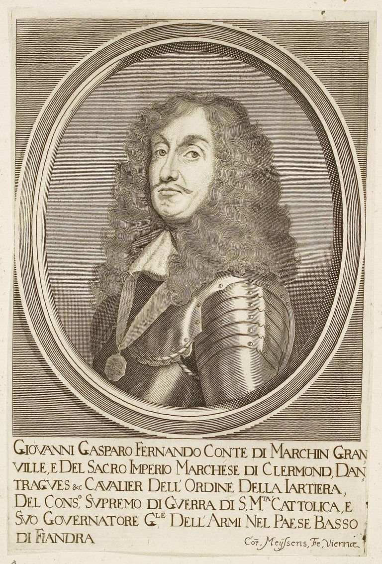 Grafik aus dem Klebeband Nr. 1 der Fürstlich Waldeckschen Hofbibliothek Arolsen Motiv: Jean Gaspard Ferdinand De Marchin (1601–1673), seit 1635 in franz. Militärdienst auf verschiedenen Kriegsschauplätzen, 1644–1646 unter d'Enghien, 1647 lieutenant général, 1649 Oberbefehlshaber der franz. Armee in Katalonien